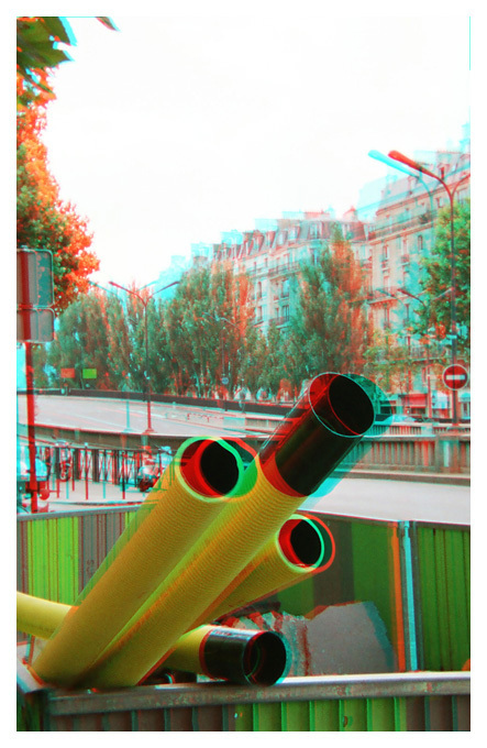 Anaglyphe hyperstéréoscopique: les tuyaux traversent l'écran!